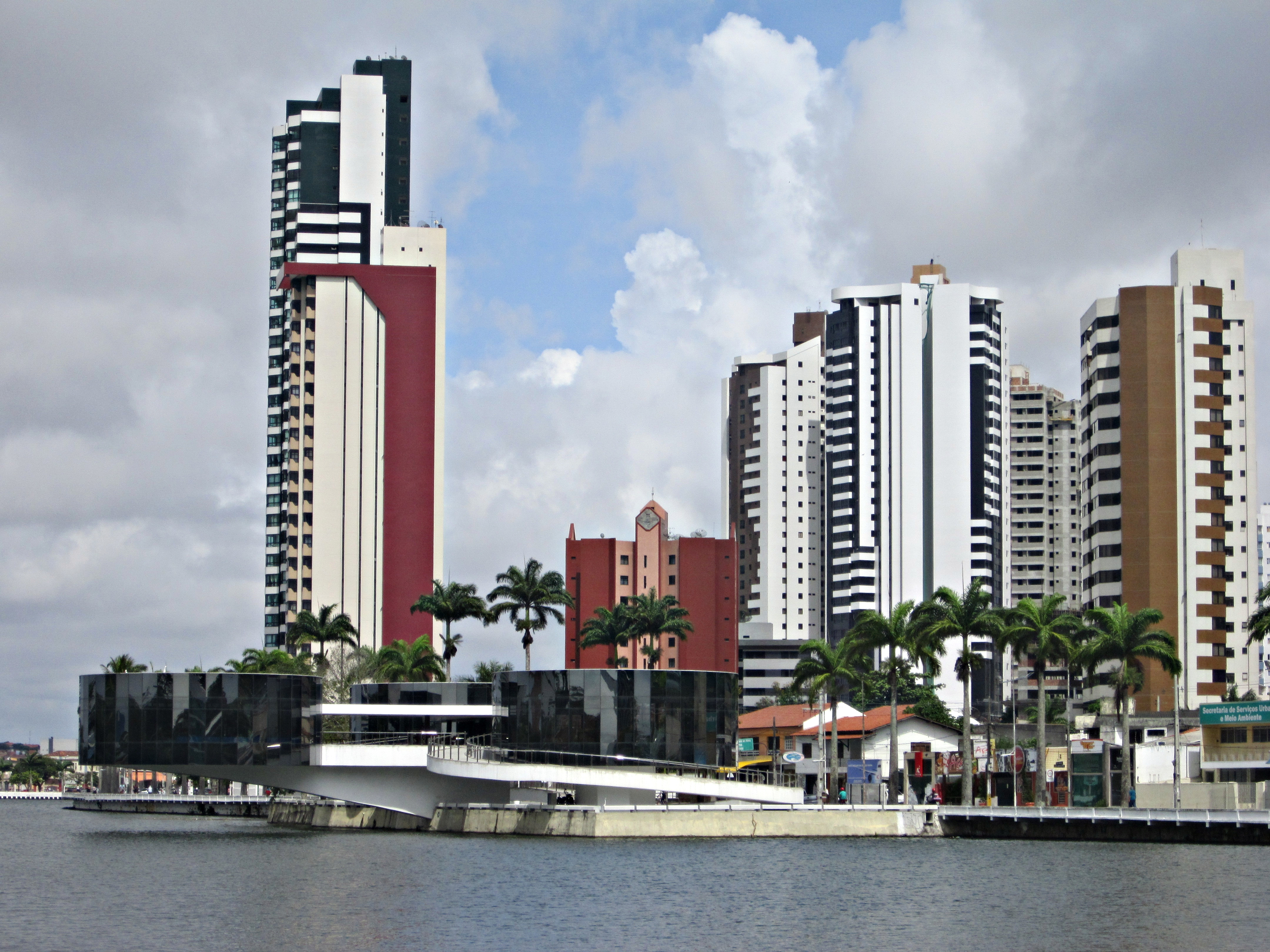 Açude Velho e Museu de Arte Popular da Paraíba - Campina Grande, Paraíba, Brasil